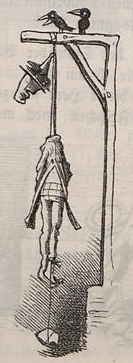 Fliegende Blätter, Band 33, Seite 110, Bild 4